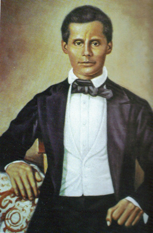 Retrato de Francisco del Rosario Sánchez, padre de la patria dominicana.